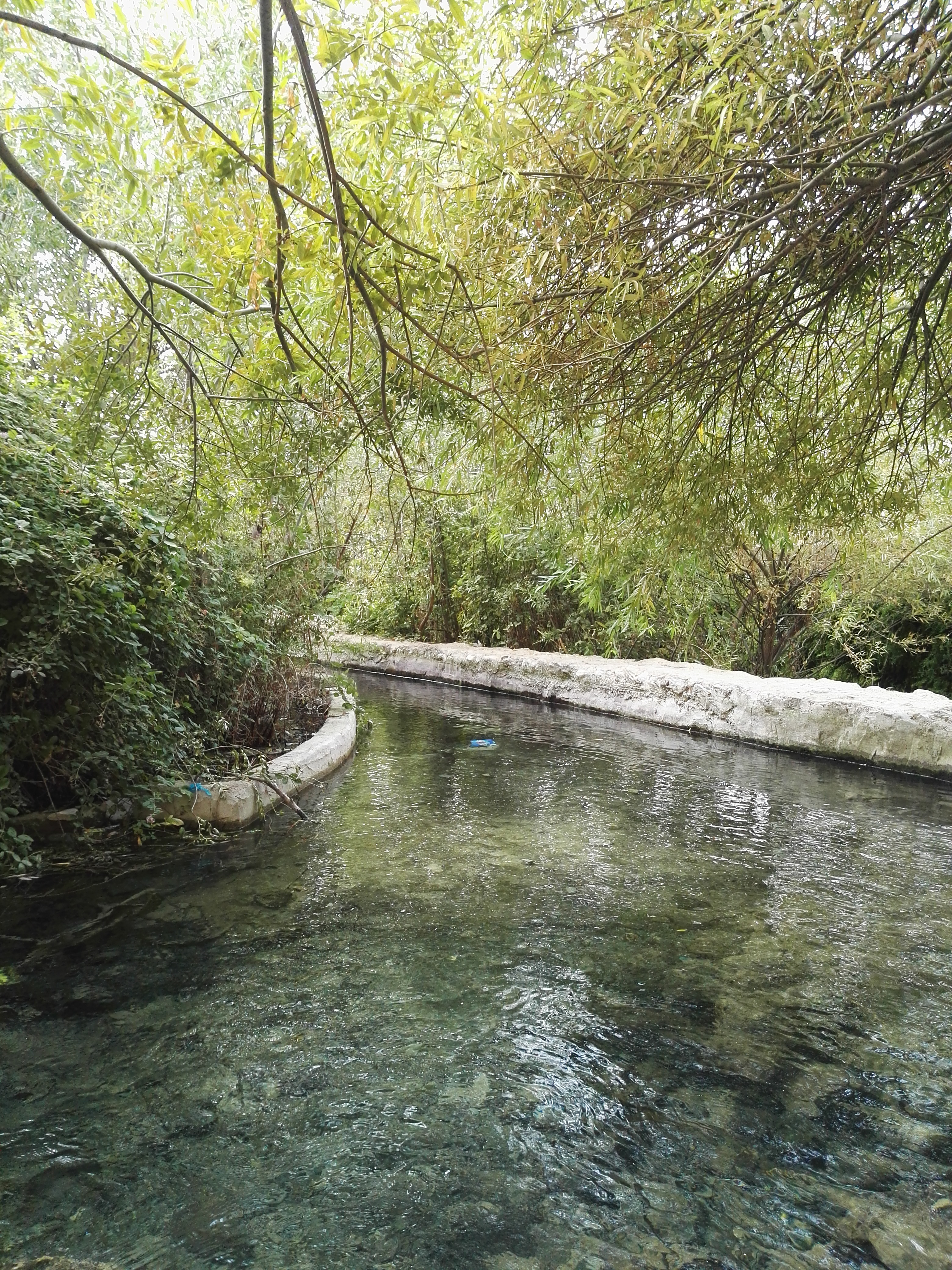 روستای سندگان سفلی